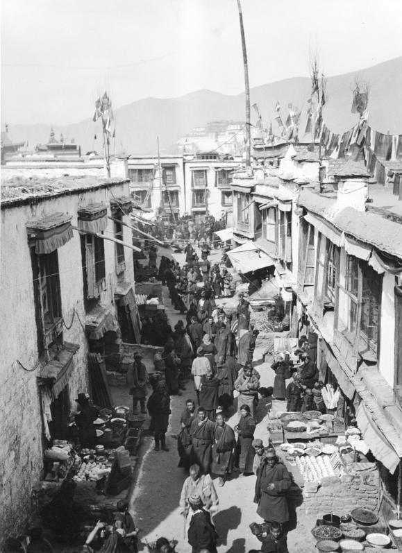 Tibetexpedition, Markt in Lhasa Lhasa, Bazar